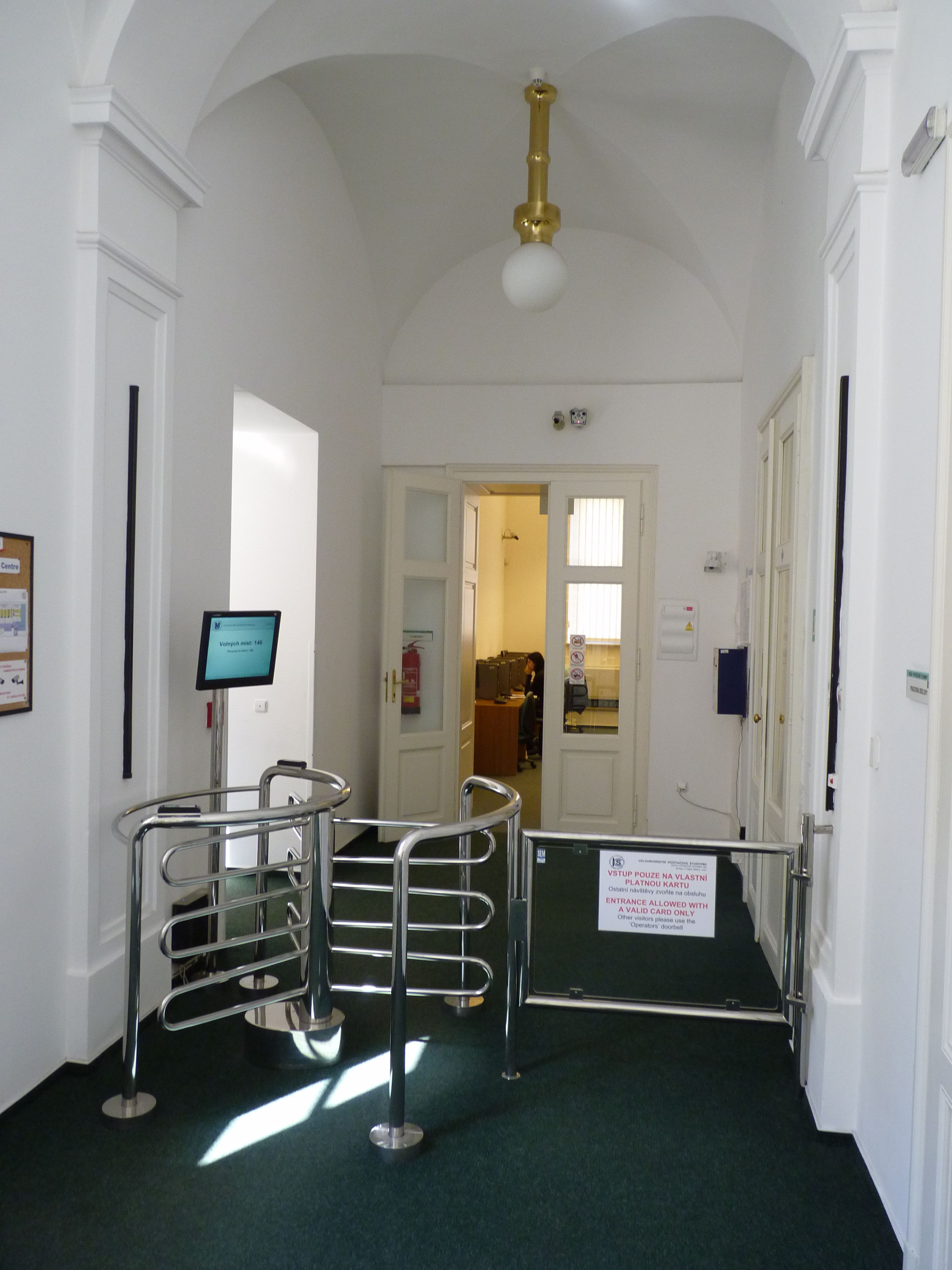 Centrální počítačová studovna MU, Brno